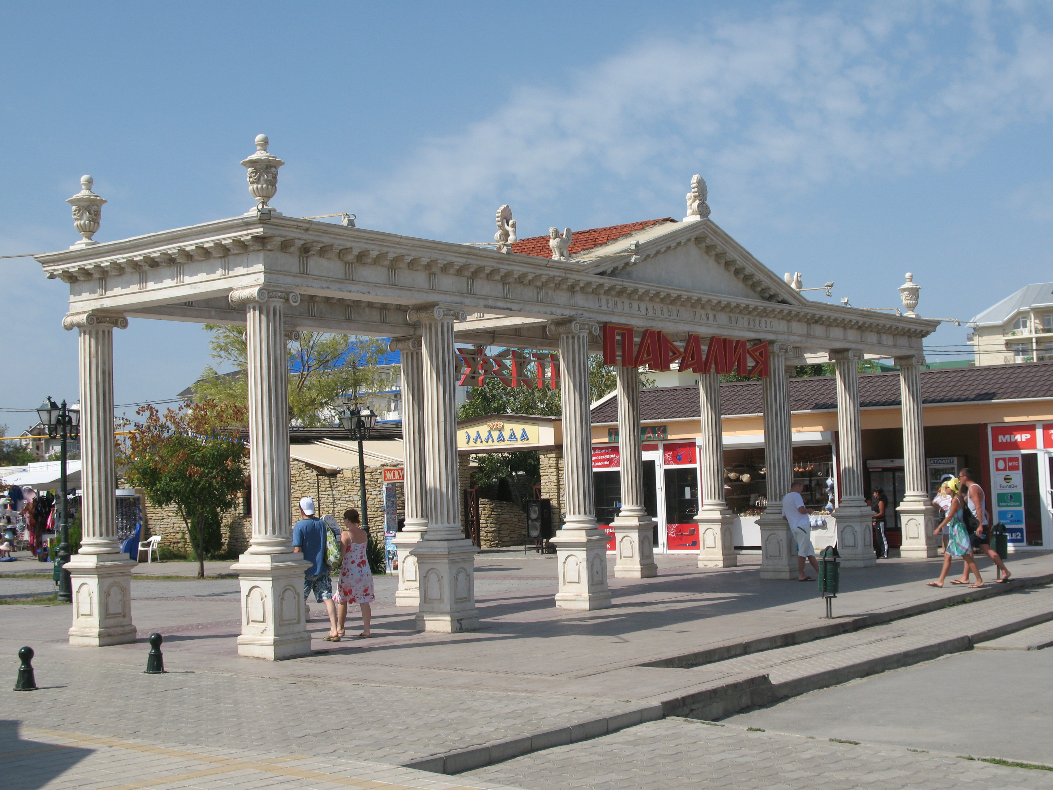 Витязево с колеса обозрения